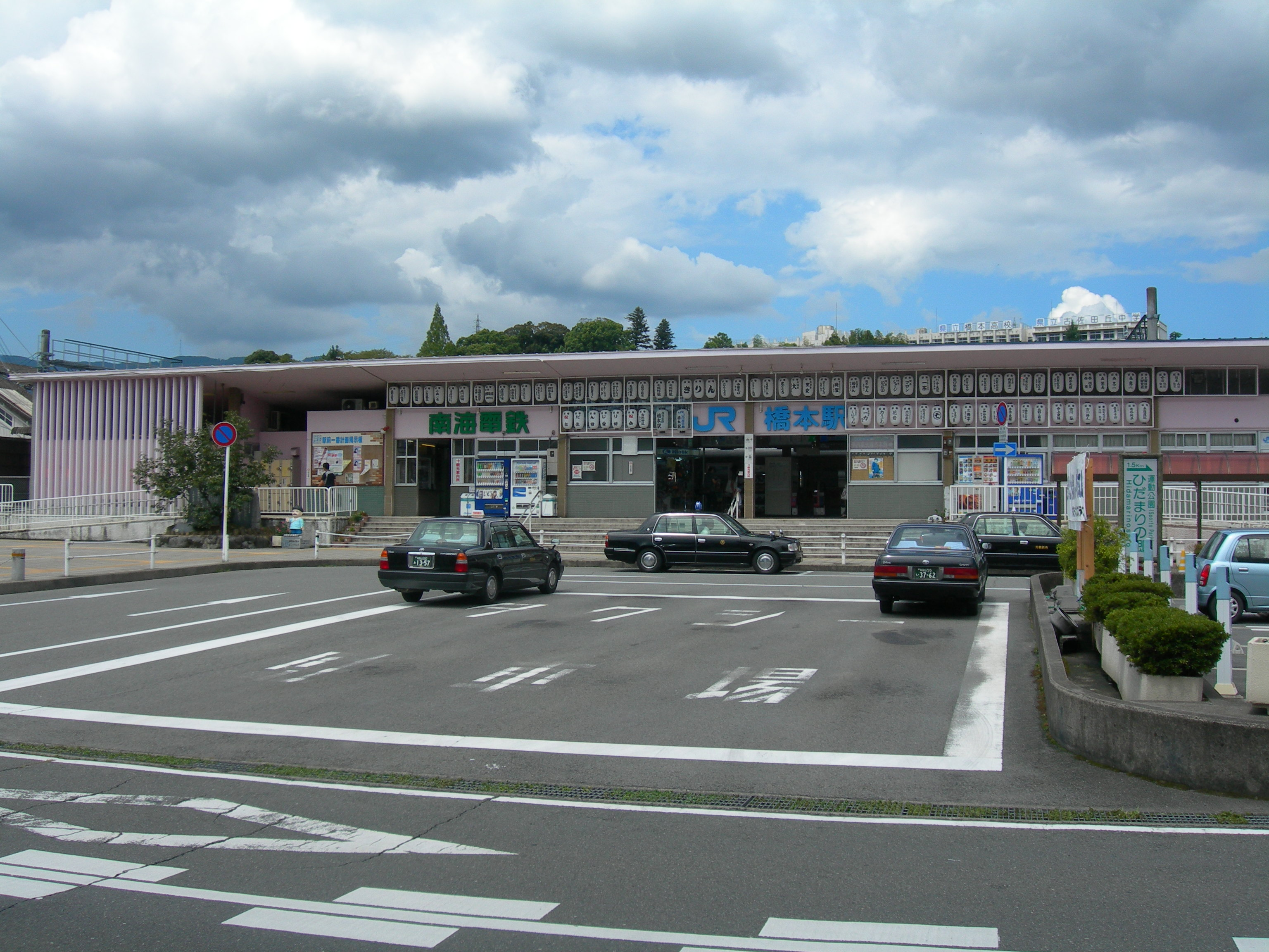 橋本駅 (和歌山県)